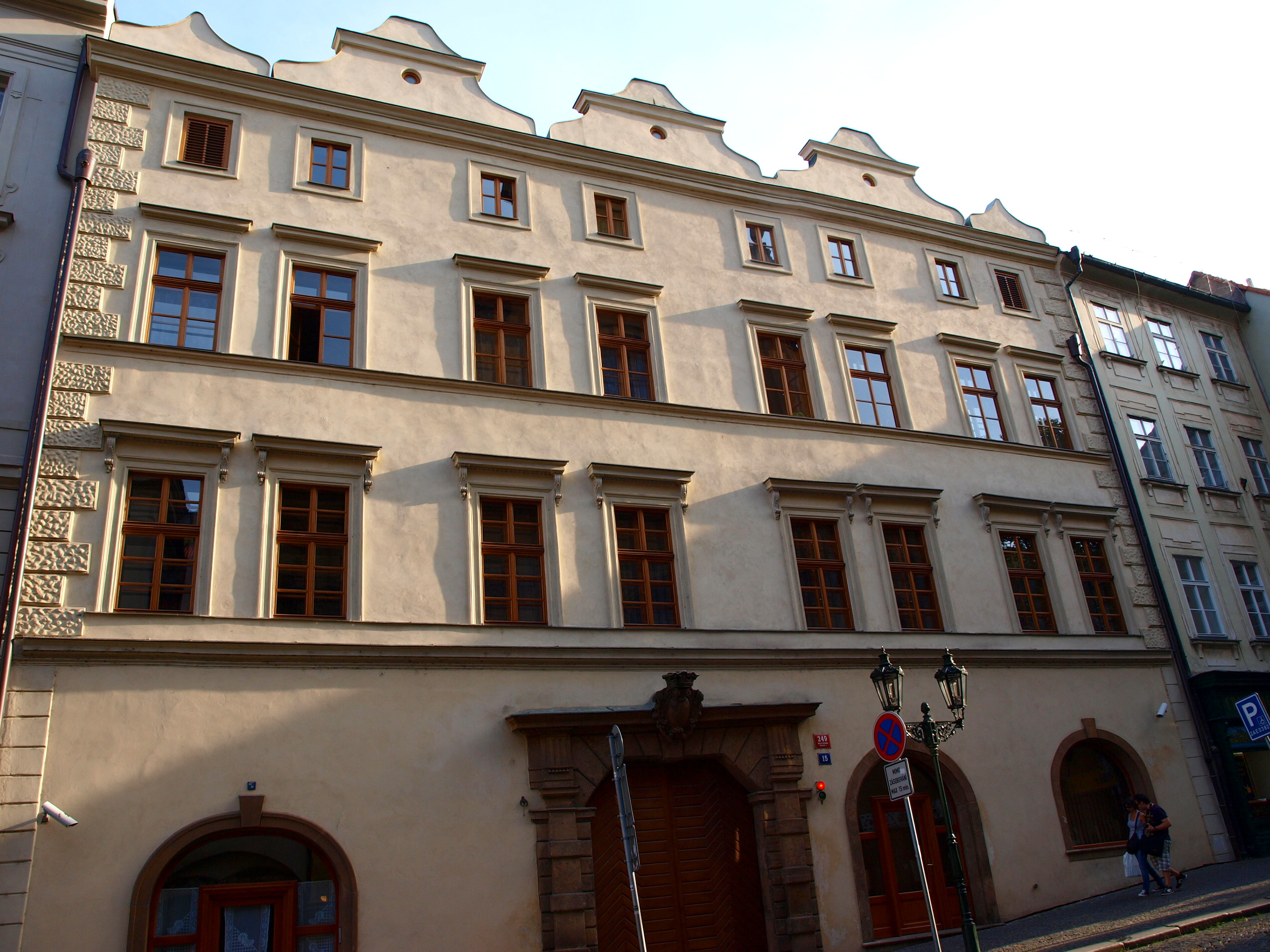 Palác Kinských na Malé Straně